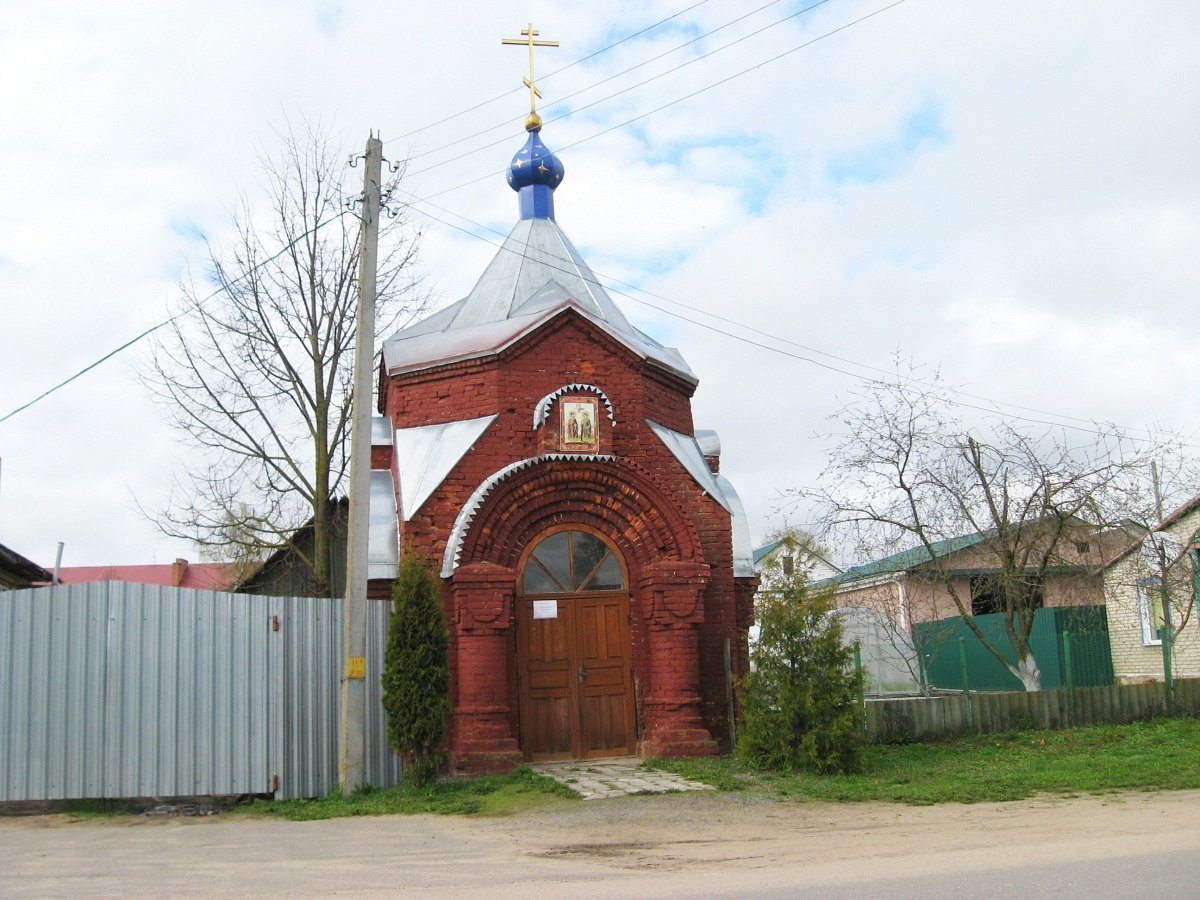 Дуброўна. Капліца Барыса і Глеба